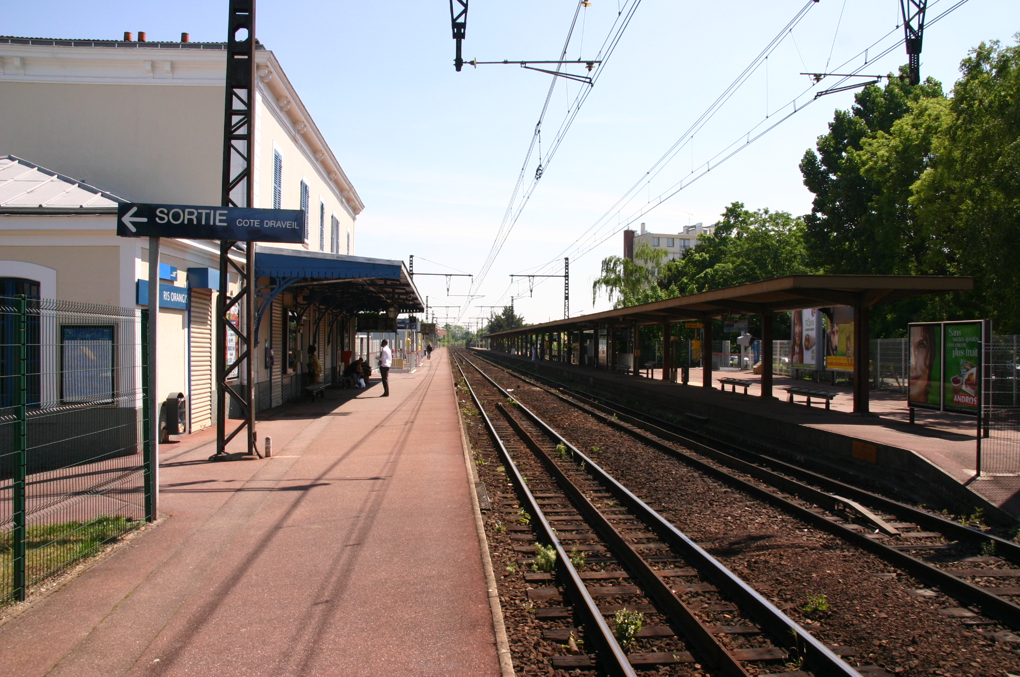 La Gare de Ris-Orangis, Ris-Orangis, département l'Essonne, France